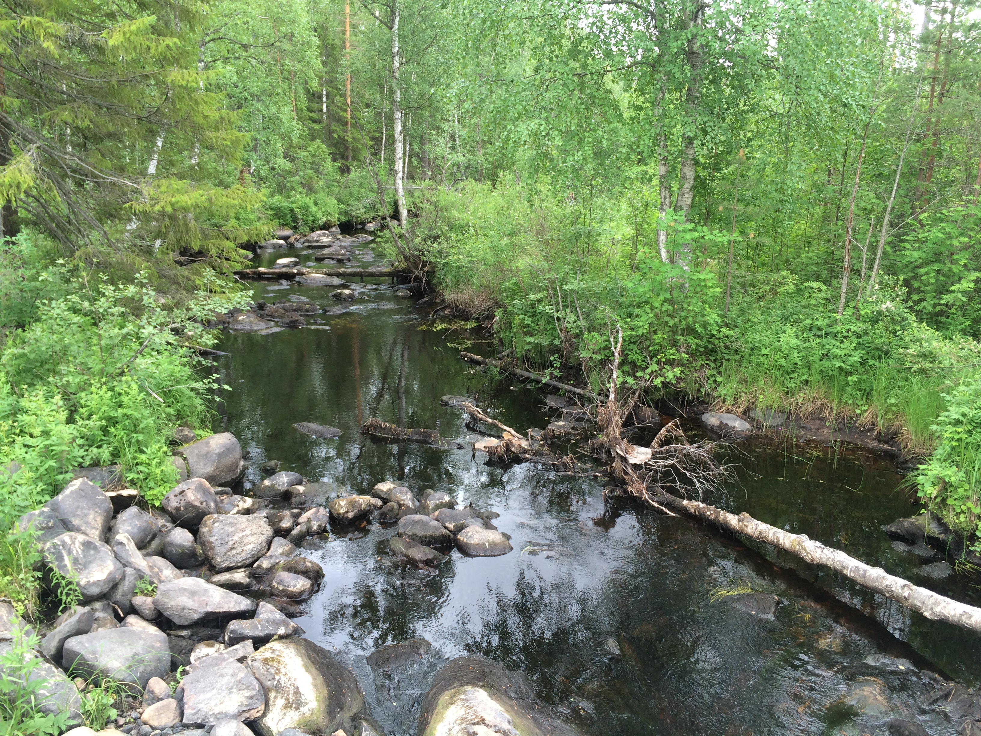 Тянукса (река, впадает в Выгозеро)